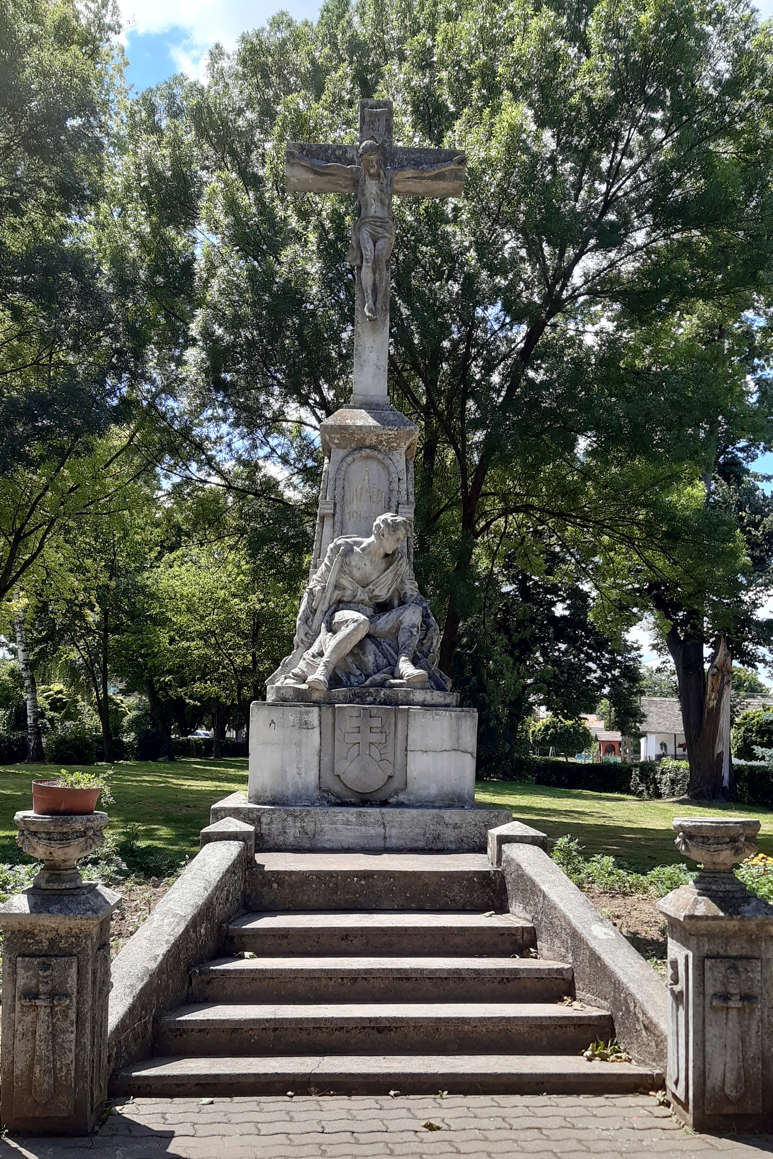 Hősök szobra, Vásárosdombó, Fetter Károly alkotása (1929)